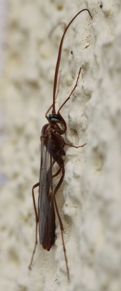 Schlupfwespe Ophion obscuratus am 6.11.2016 in Oftersheim